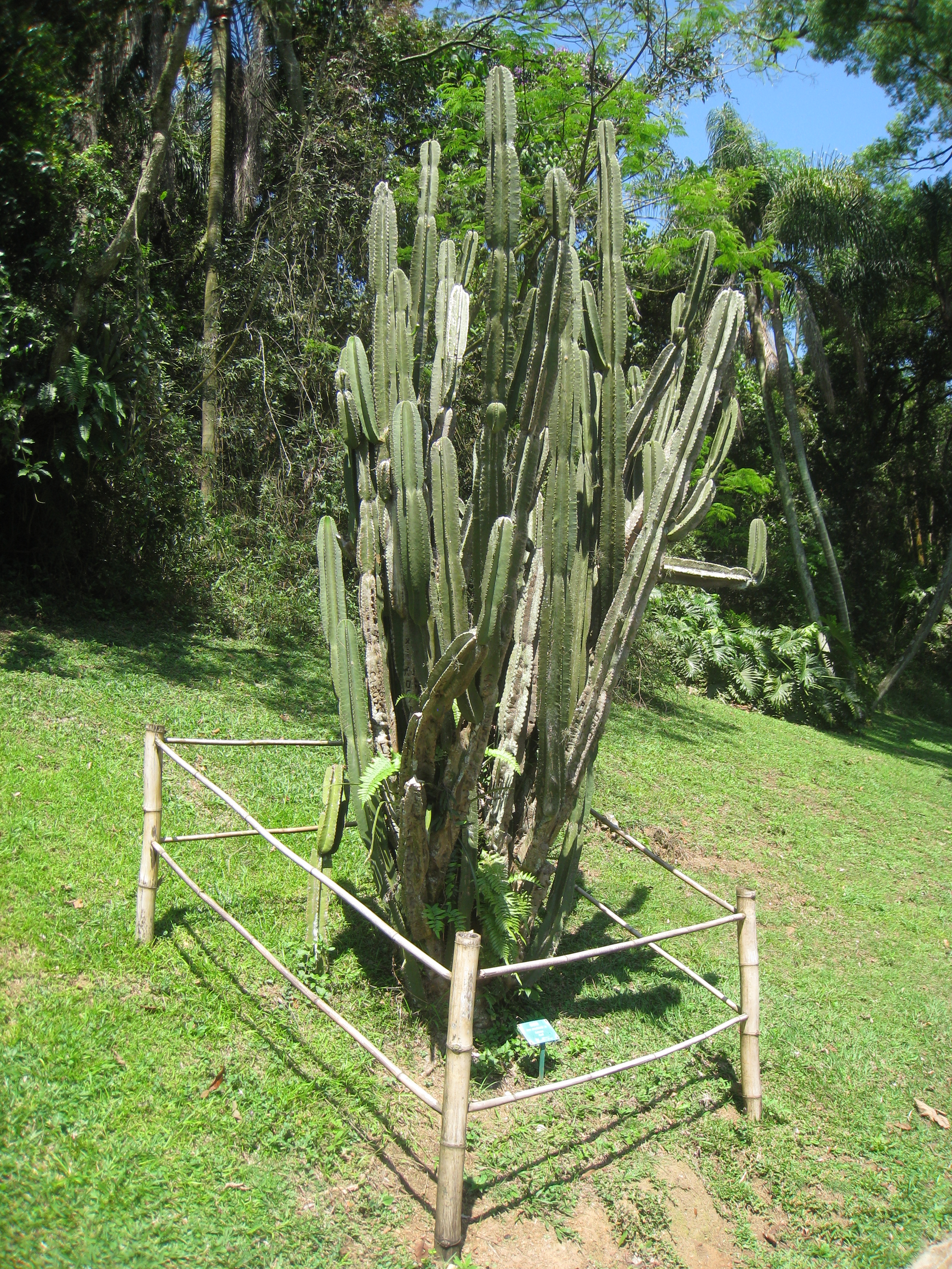 Cereus fernambucensis in the Jardim Botânico de São Paulo, São Paulo City, SP, Brazil.